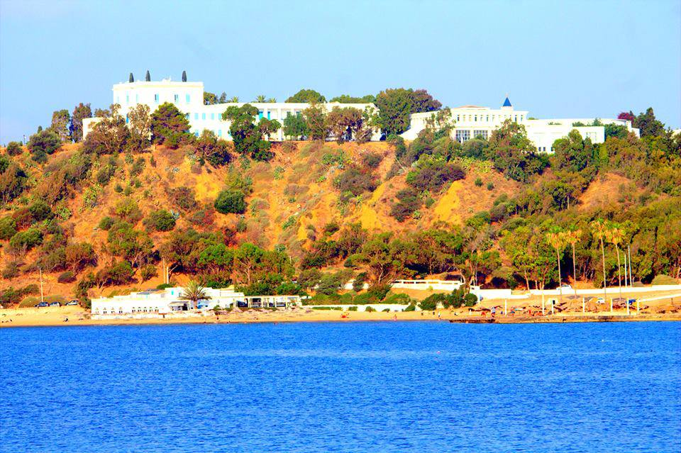 Campus d'IHEC Carthage vu par la baie de Sidi BouSaid